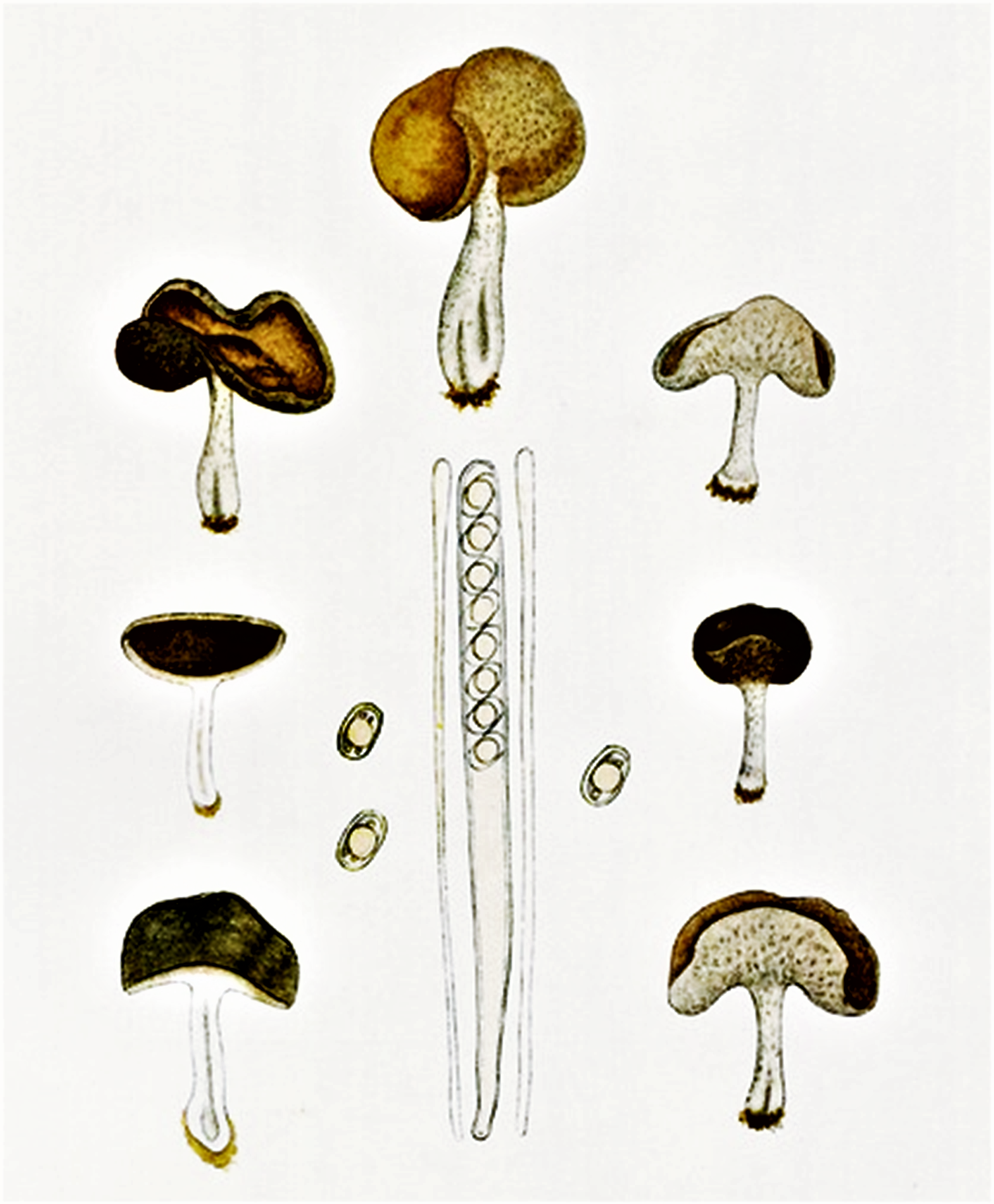 Giacomo Bresadola: Helvella ephippium Lév. (1841)